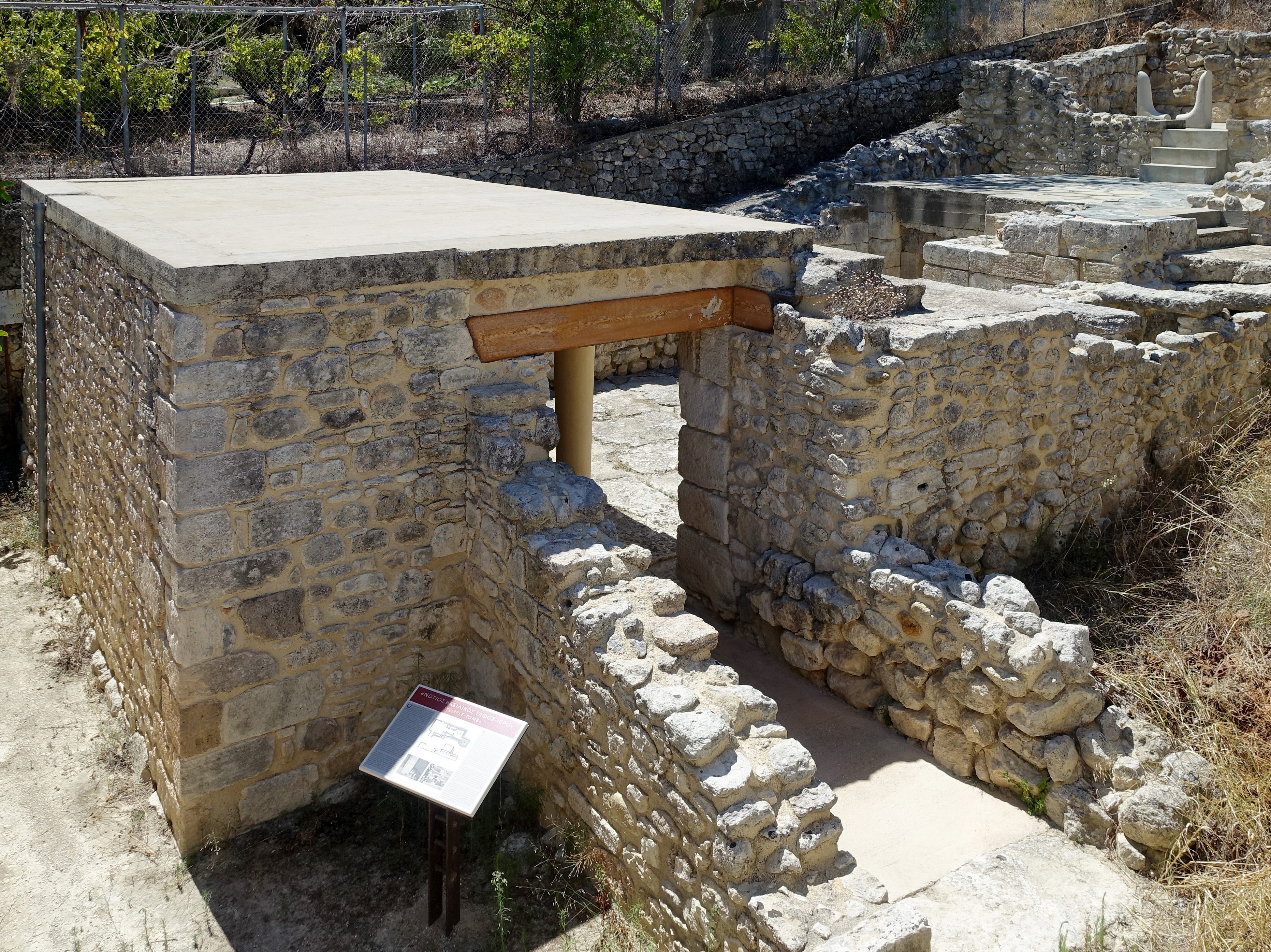 Ausgrabungsstätte des königlichen Tempelgrabes (Βασιλικός Τάφος και Ιερό) bei Knossos (Κνωσσός), Gemeinde Iraklio, Regionalbezirk Iraklio, Kreta, Griechenland